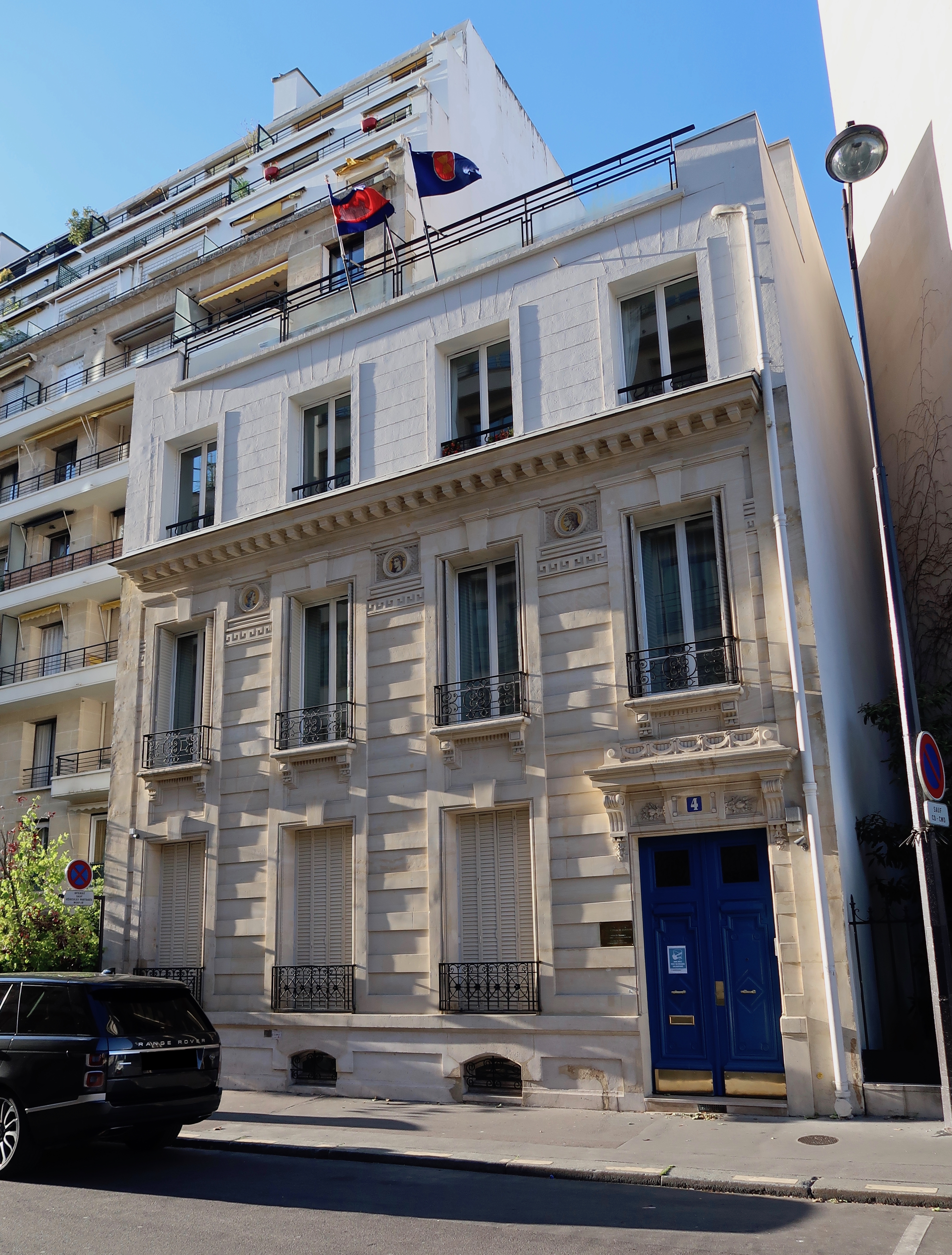 Ambassade du Cambodge en France, 4 rue Adolphe-Yvon (Paris, 16e).